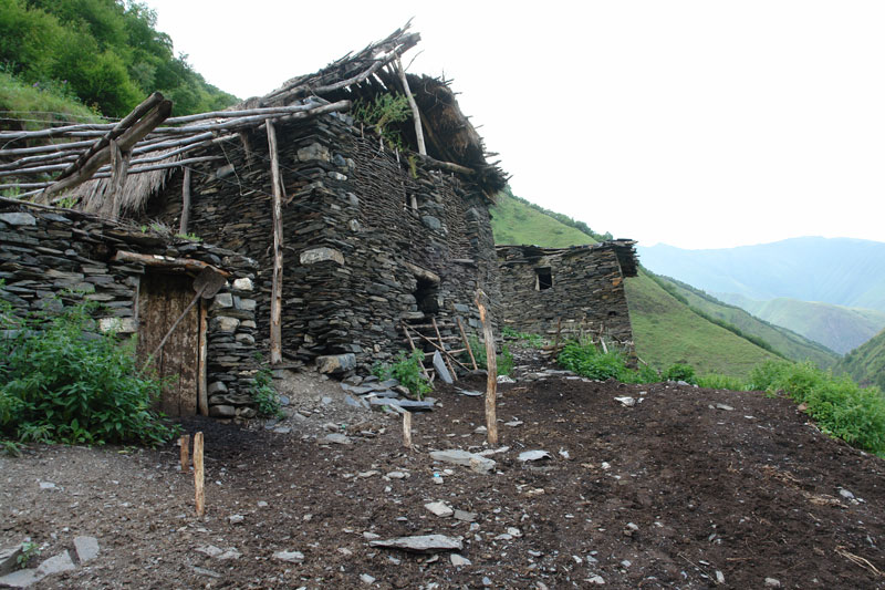 Georgia, Khevsureti